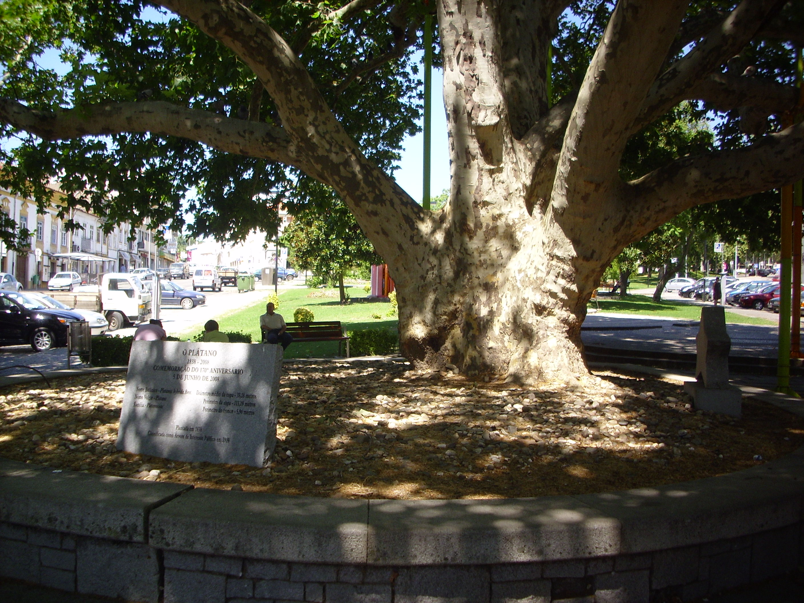 Portalegre